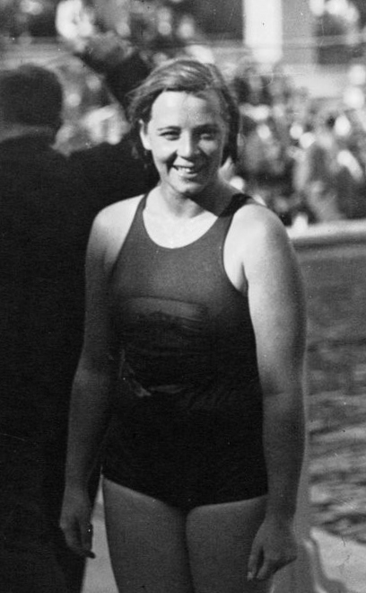 Les Tourelles : Championnats d'Europe : Mlle Braun, 100 m dos (portrait à 3 m) : [photographie de presse] / Agence Meurisse